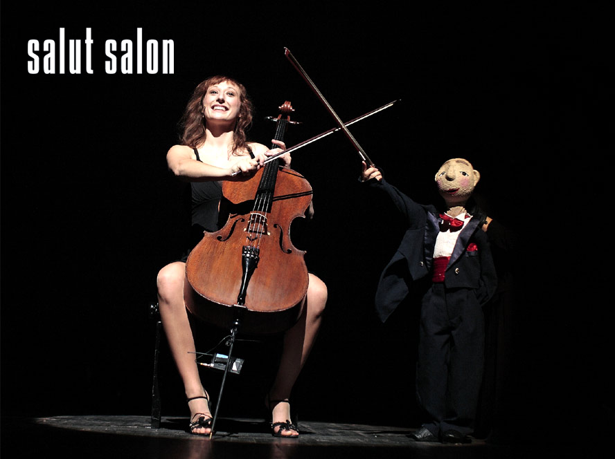 Die Puppe Oskar spielt in jedem Salut-Salon-Programm eine wichtige Rolle.